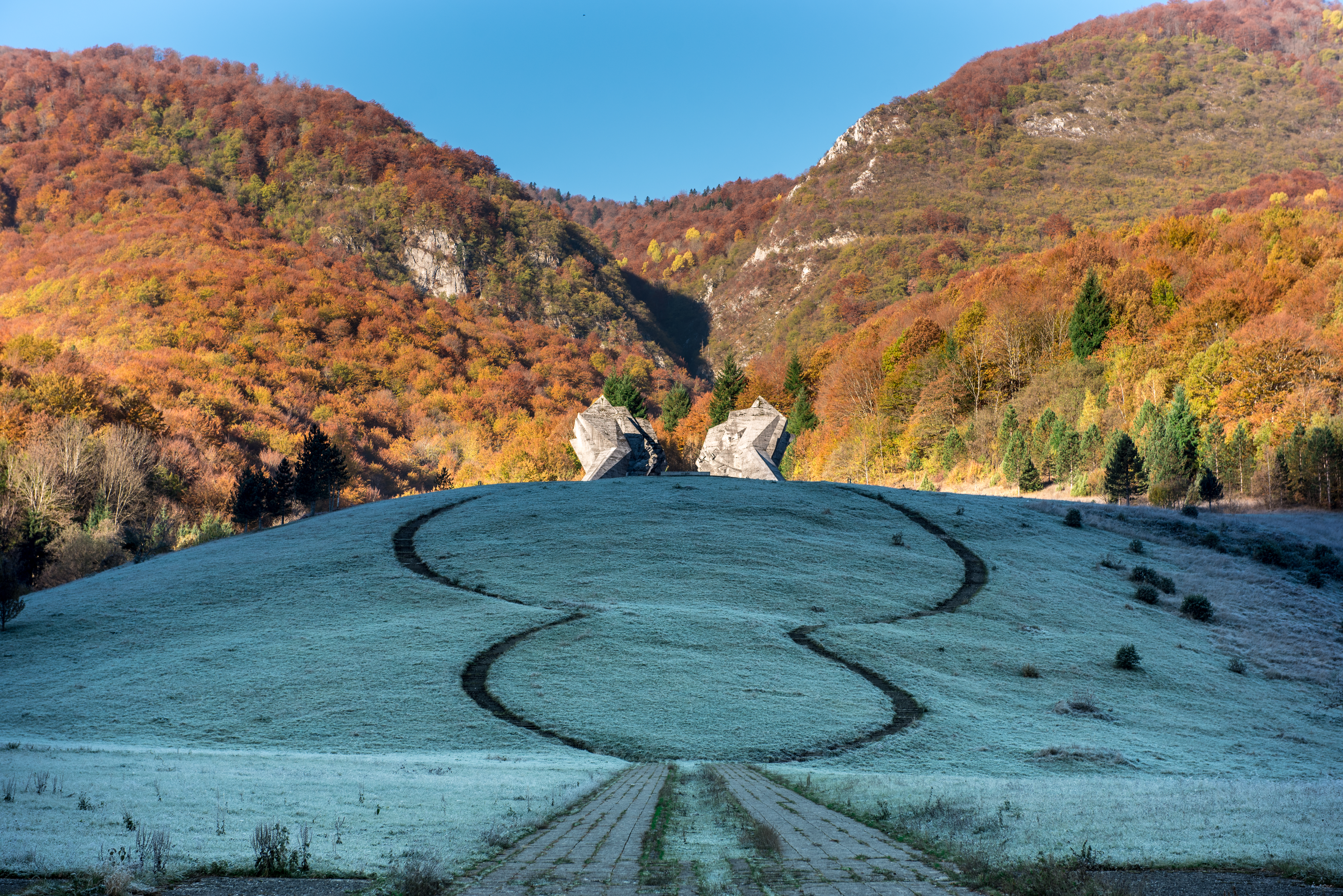 This image was uploaded as part of Trace of Soul 2016.